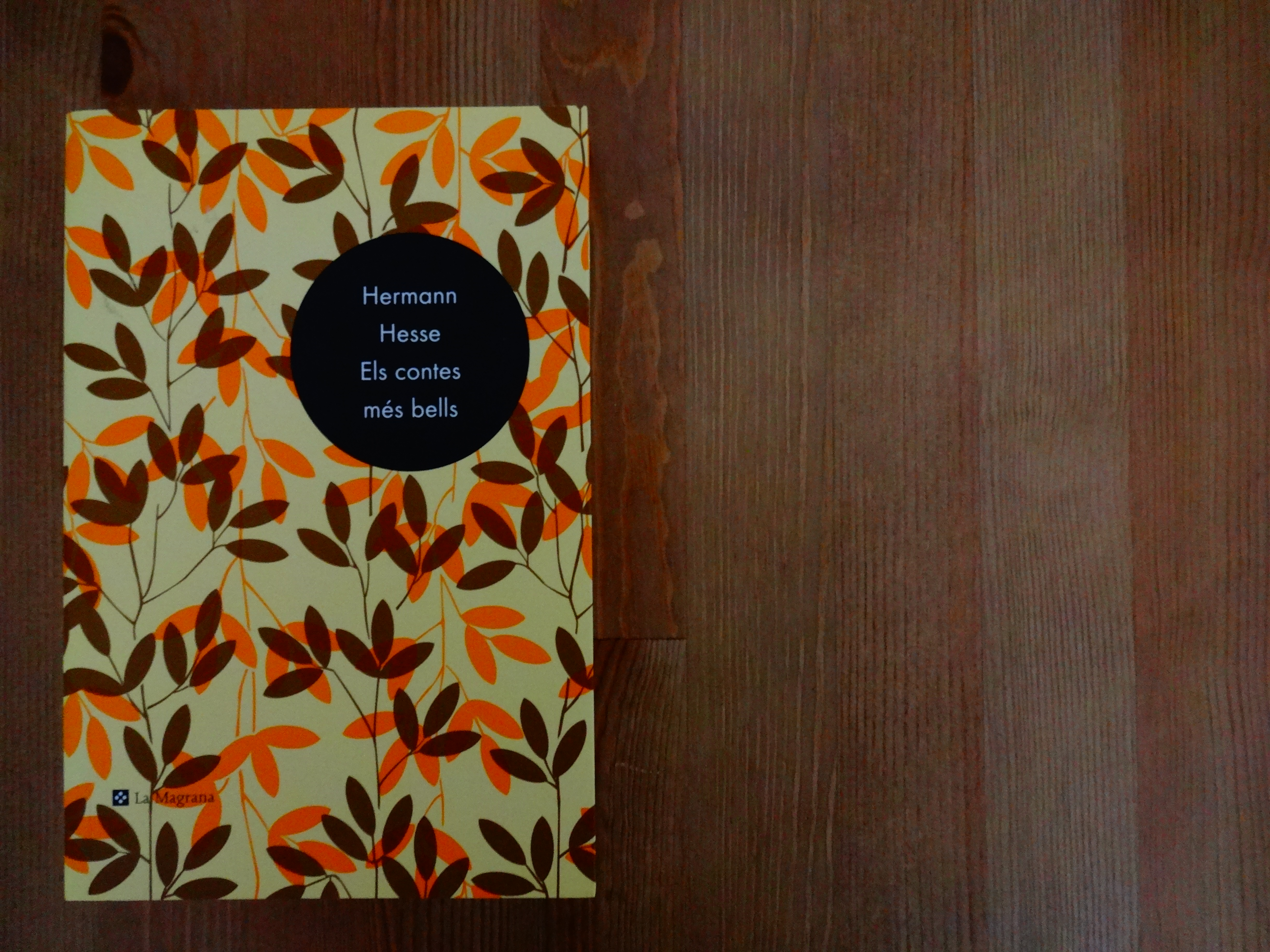 foto libro